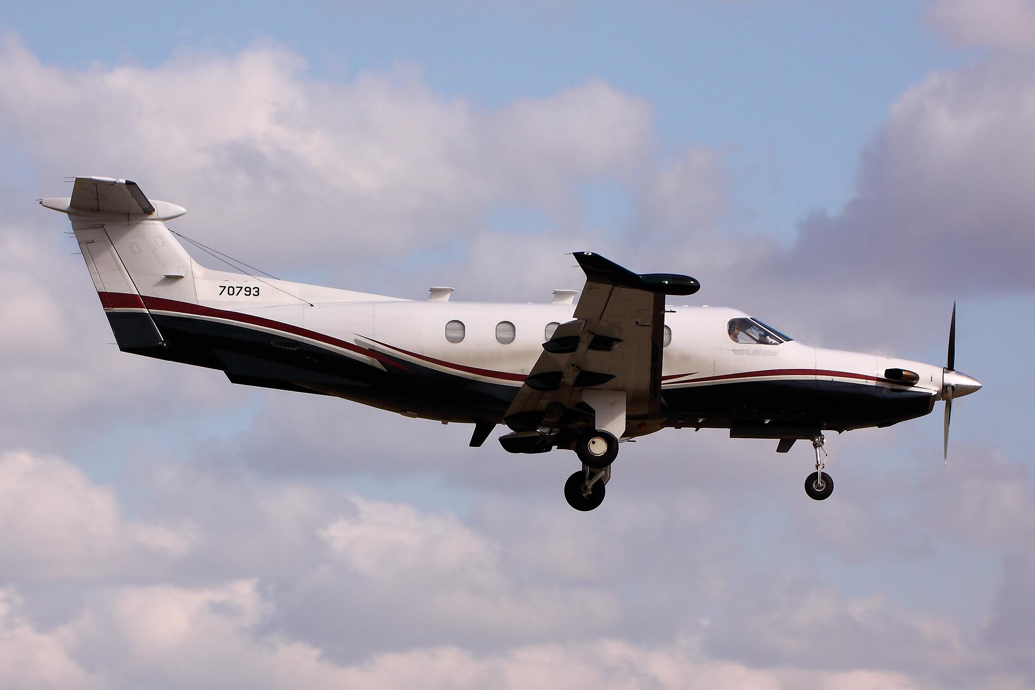 U-28A - RAF Mildenhall